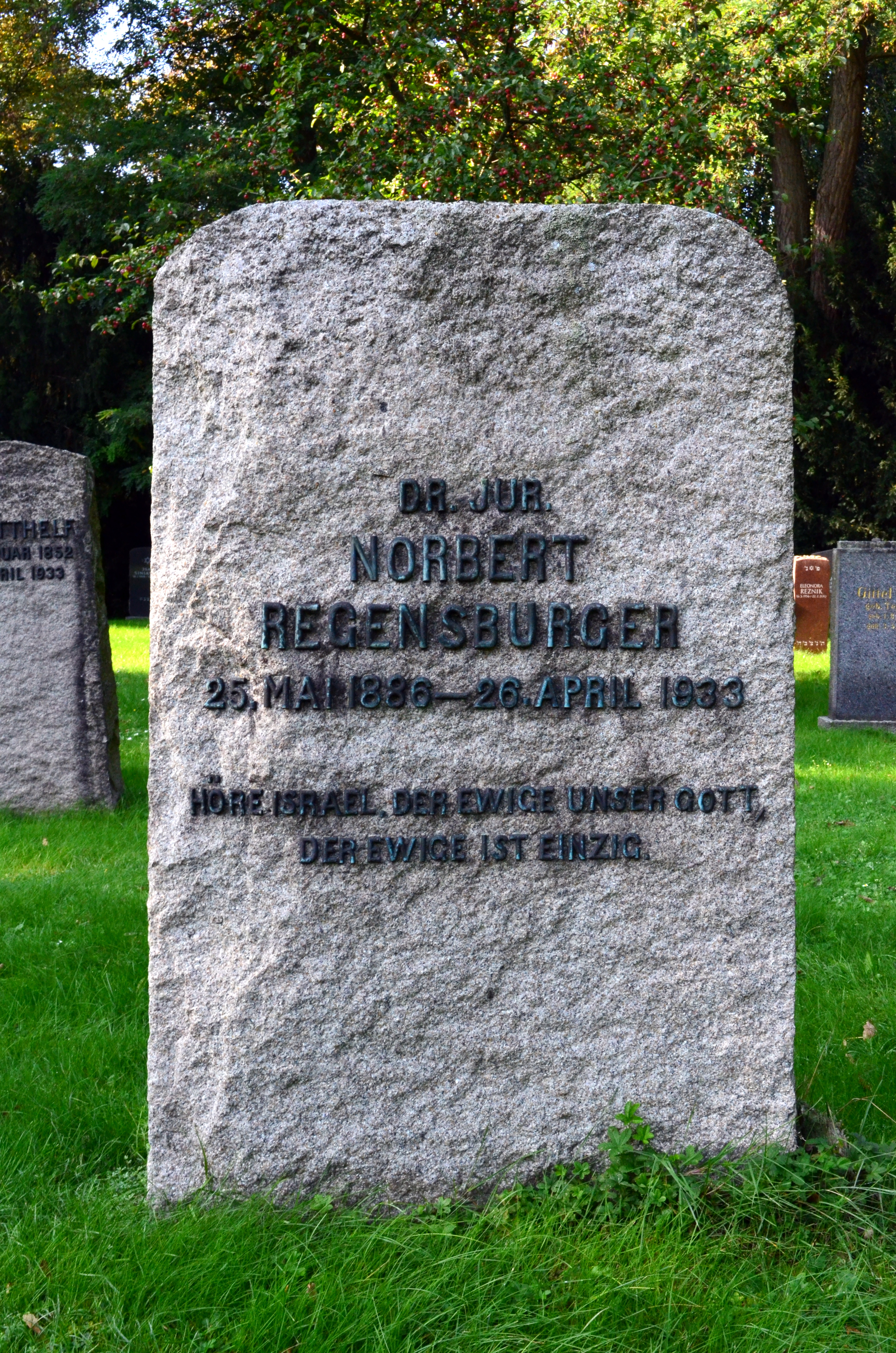 Braunschweig, Helmstedter Straße, Jüdischer Friedhof: Grabstein von Norbert Regensburger.